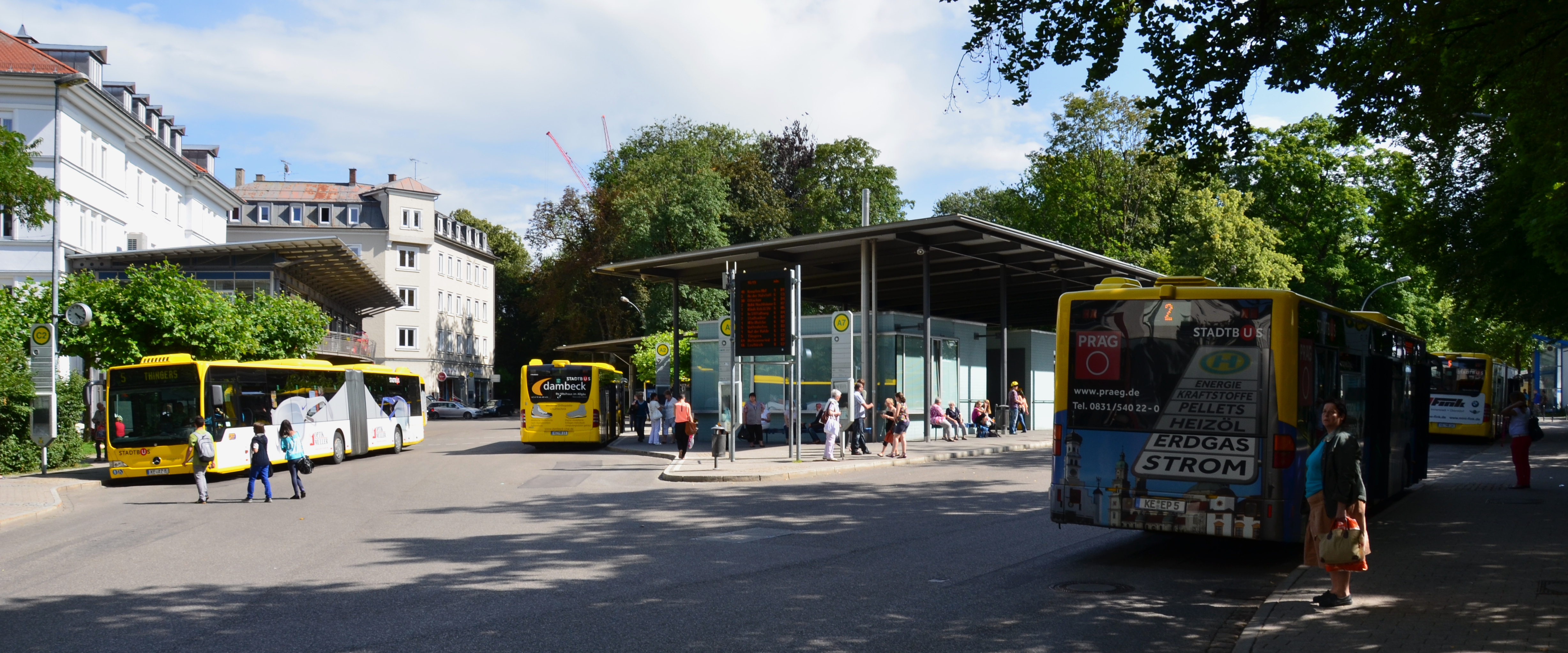 ZUM in Kempten